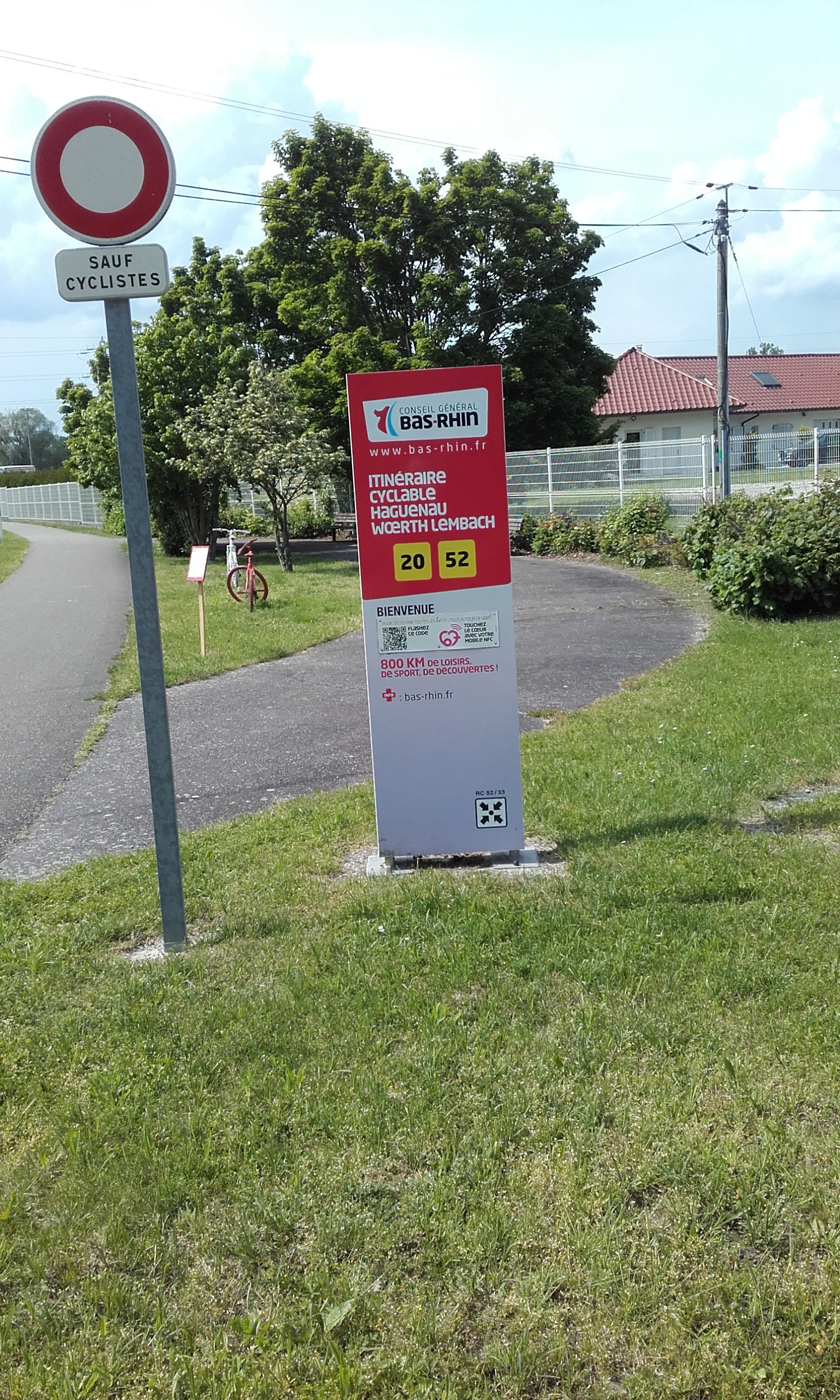 Bas-Rhin, Durrenbach, voie verte